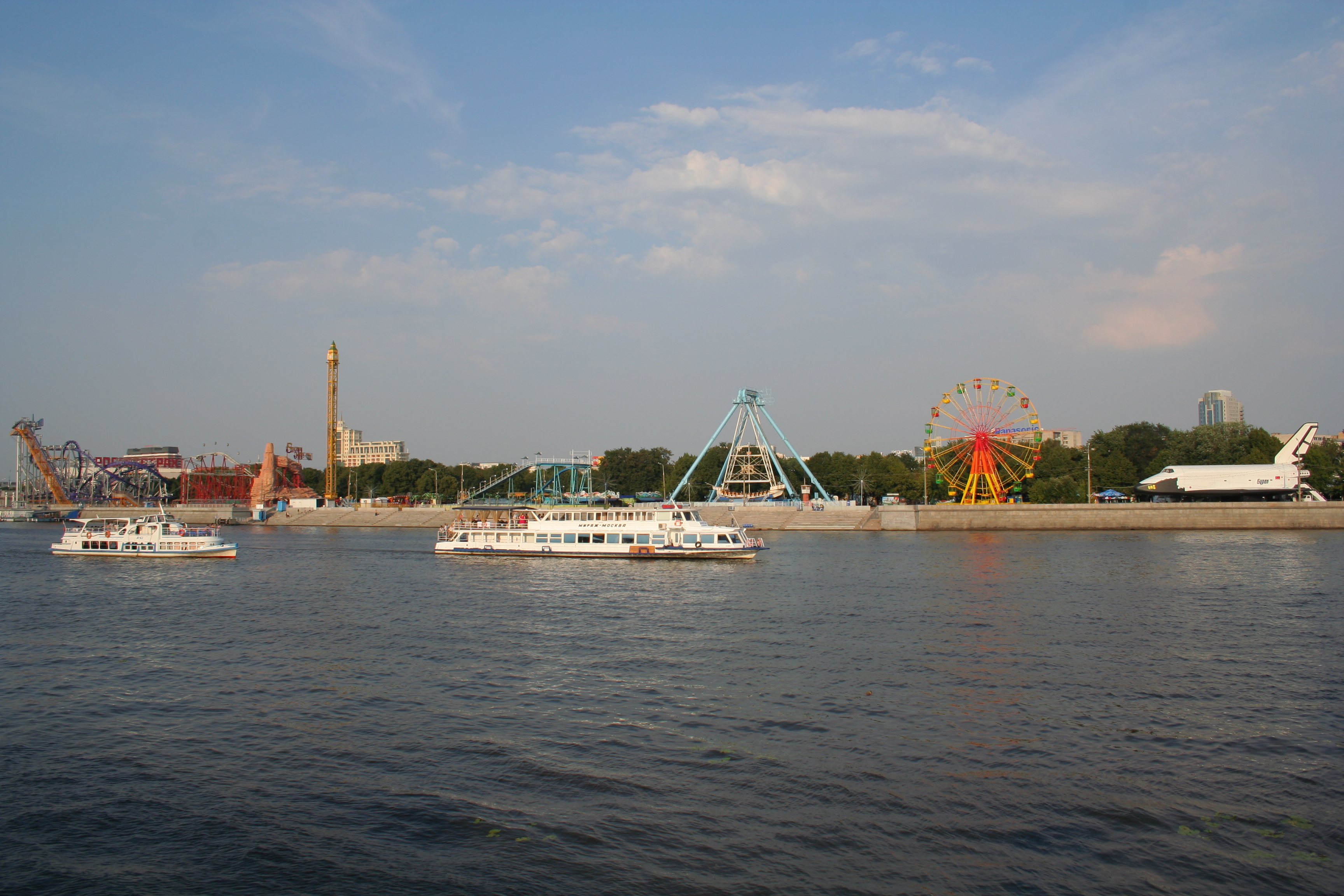 Der Gorki-Park in Moskau. Blick auf den Park von der Frunsenskaja-Uferstraße am gegenüberliegenden Ufer der Moskwa.